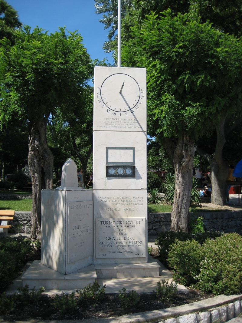 Sunčani sat u Krku, Croatia